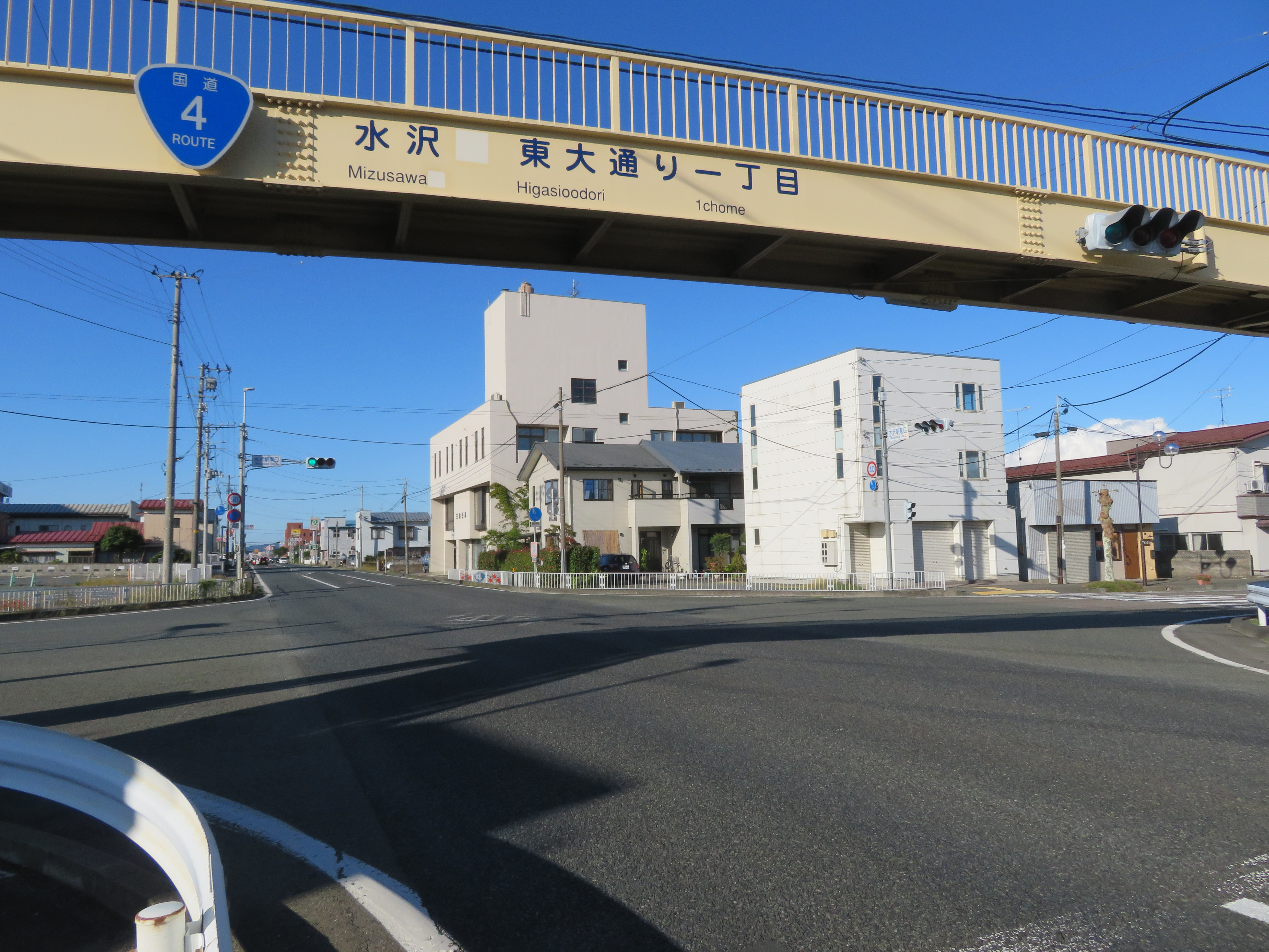 国道4号線 水沢バイパス岩手県奥州市水沢東大通り１丁目付近（北上方面を撮影）